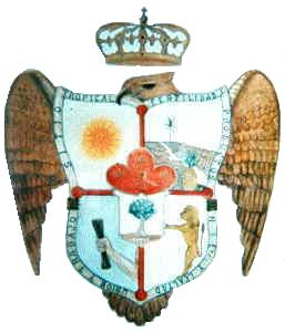 Escudo del Municipio de Amatlan de los Reyes, Veracruz.